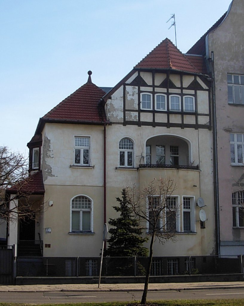 Willa Józefa Święcickiego - ulica Mickiewicza 17 w Bydgoszczy